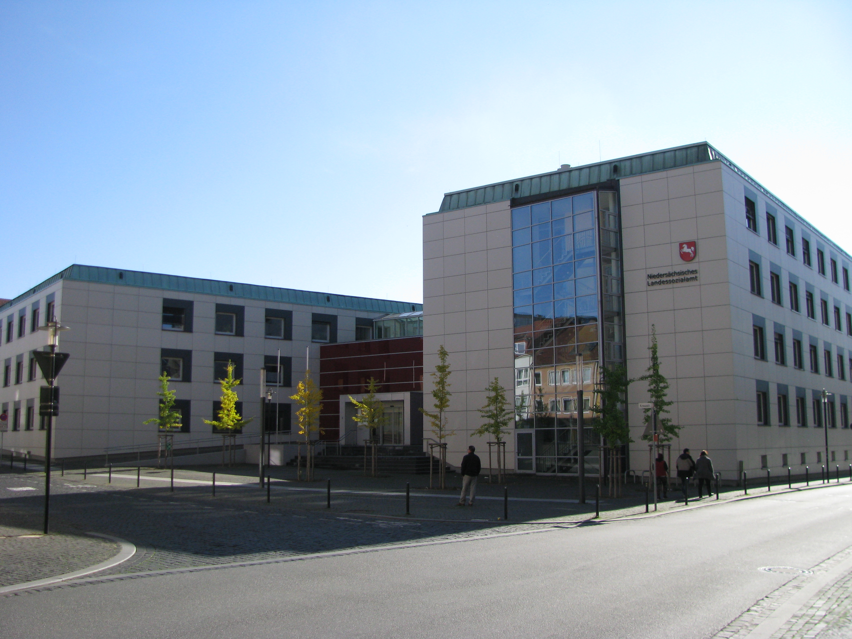 Gesamtanlage des Sozialgericht, des Arbeitsgericht und des Landessozialamt in Hildesheim